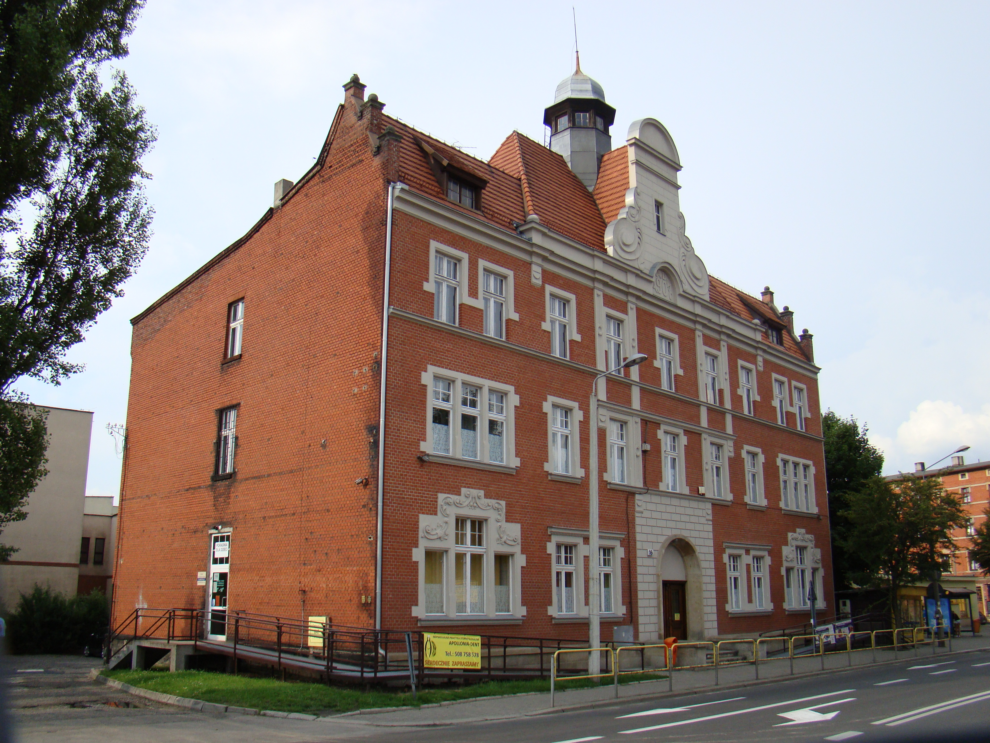 Katowice, ratusz gminy Dąbrówka Mała, ob. przychodnia, 1907